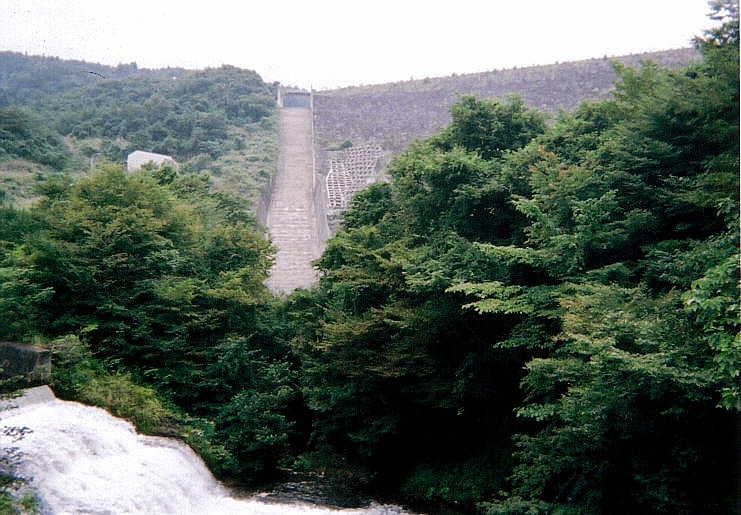 Dam